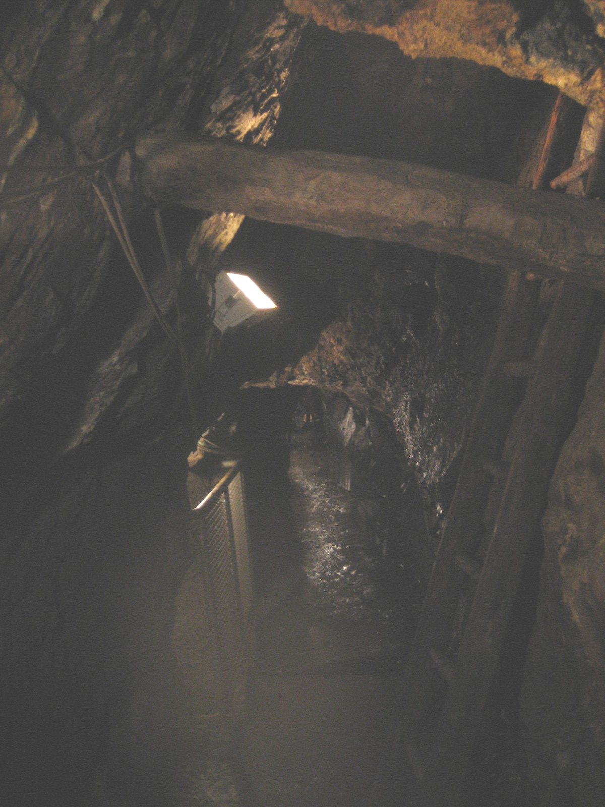 Sujet: D'Koffergrouf vu Stolzebuerg